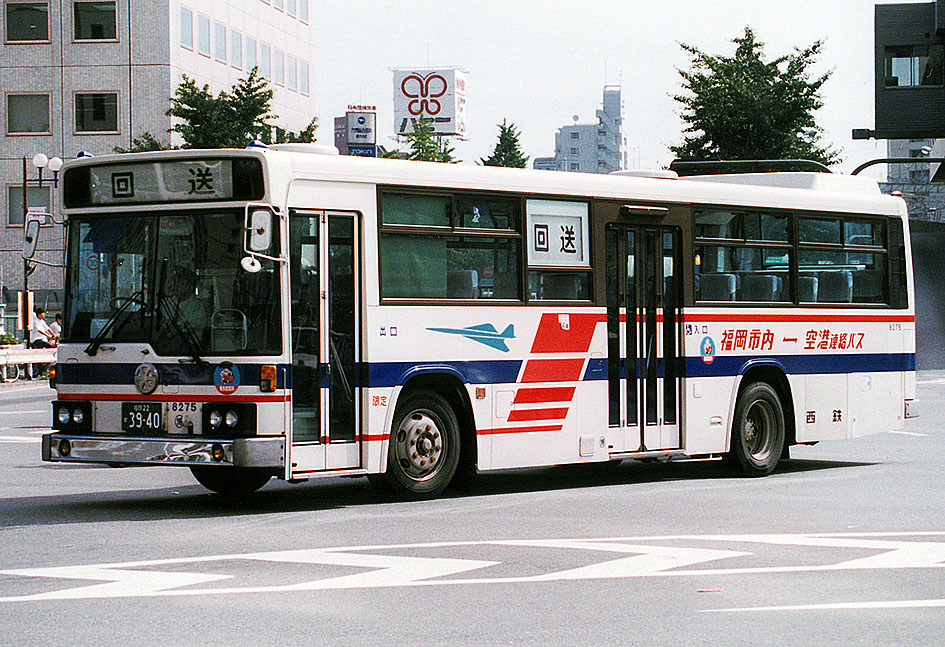 西日本鉄道 日野 P-HU235BA 西工58MC